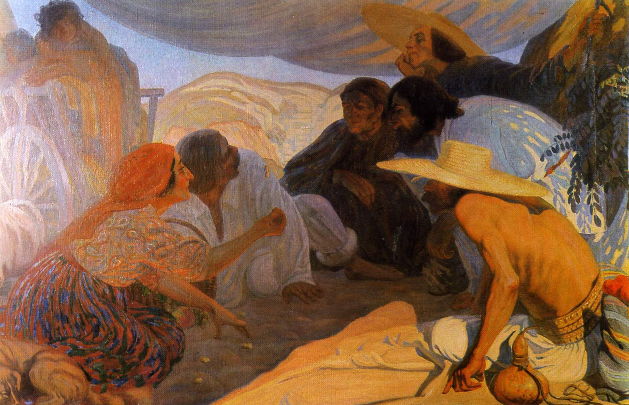 Peinture de Pavel Aleksandrovitch Chillingovski.Huile sur toile, 155 x 293 cm. Bessarabie. Bonne aventure